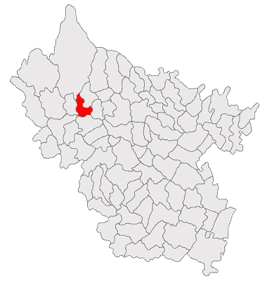 Categorie:Hărţi ale judeţului Buzău